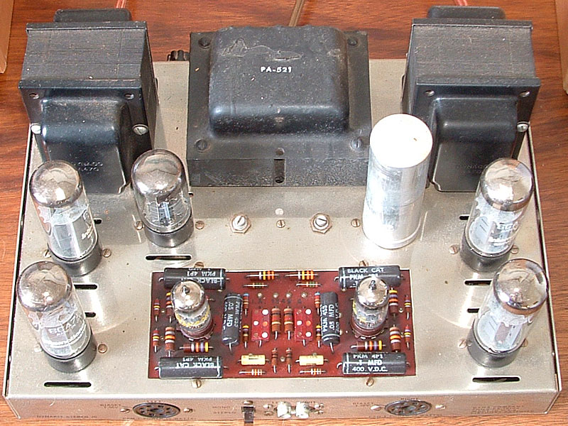 Dynaco ST-70 Top View